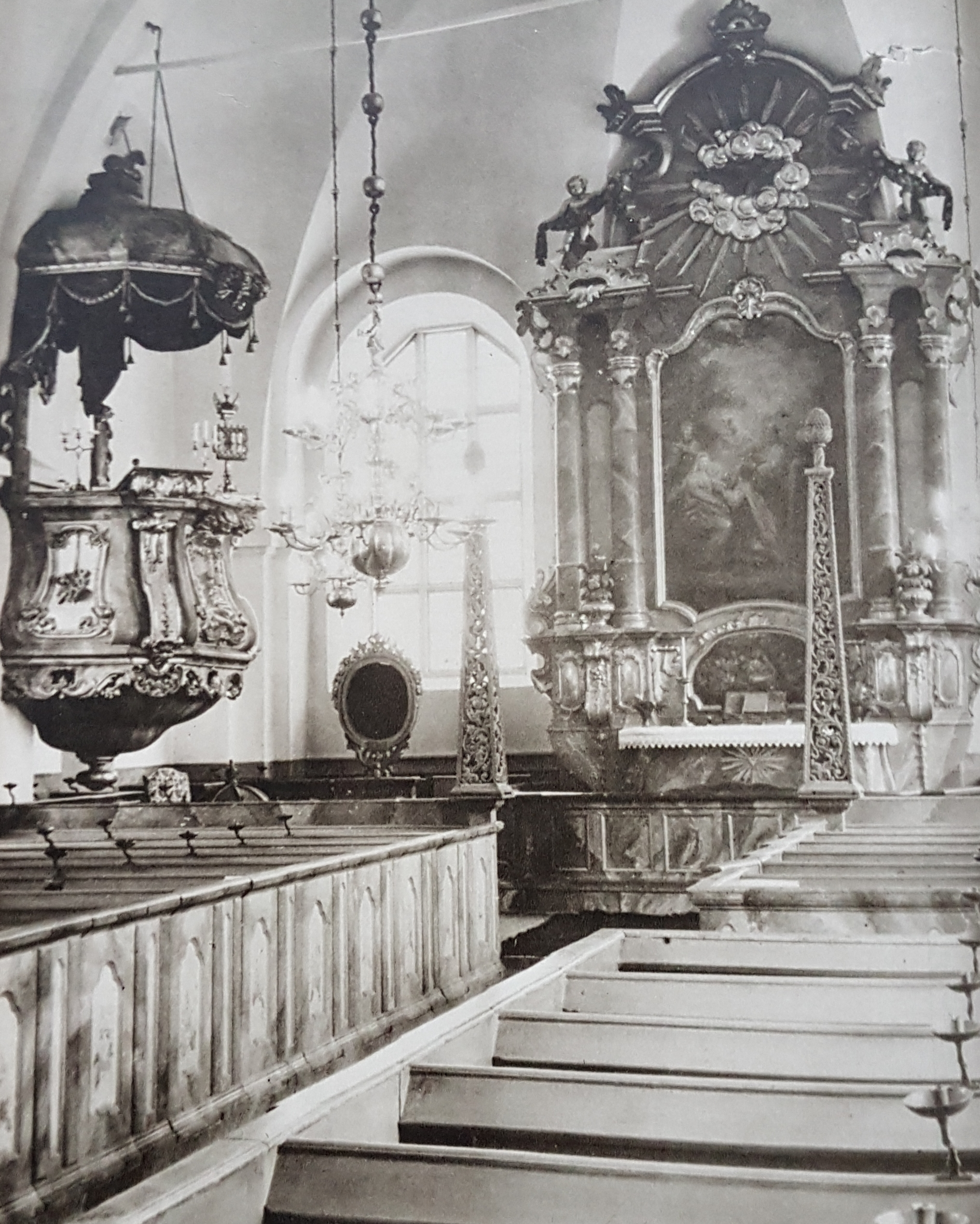 Altaruppsats predikstol Borgsjö k x Johan Edler den äldre, avfotograferad bild från Allhems Svenskt konstnärslexikon.